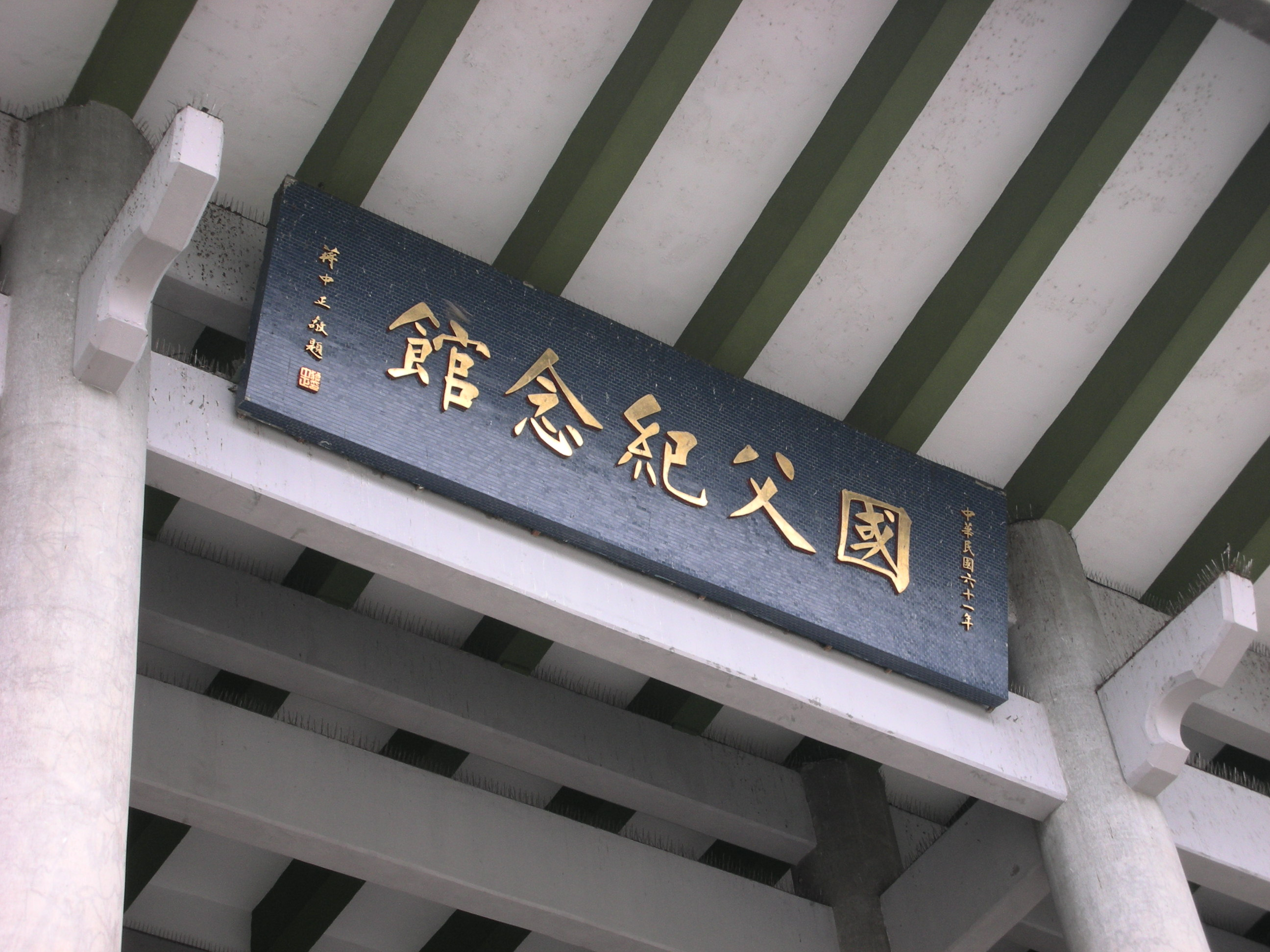 國父紀念館97/08/27